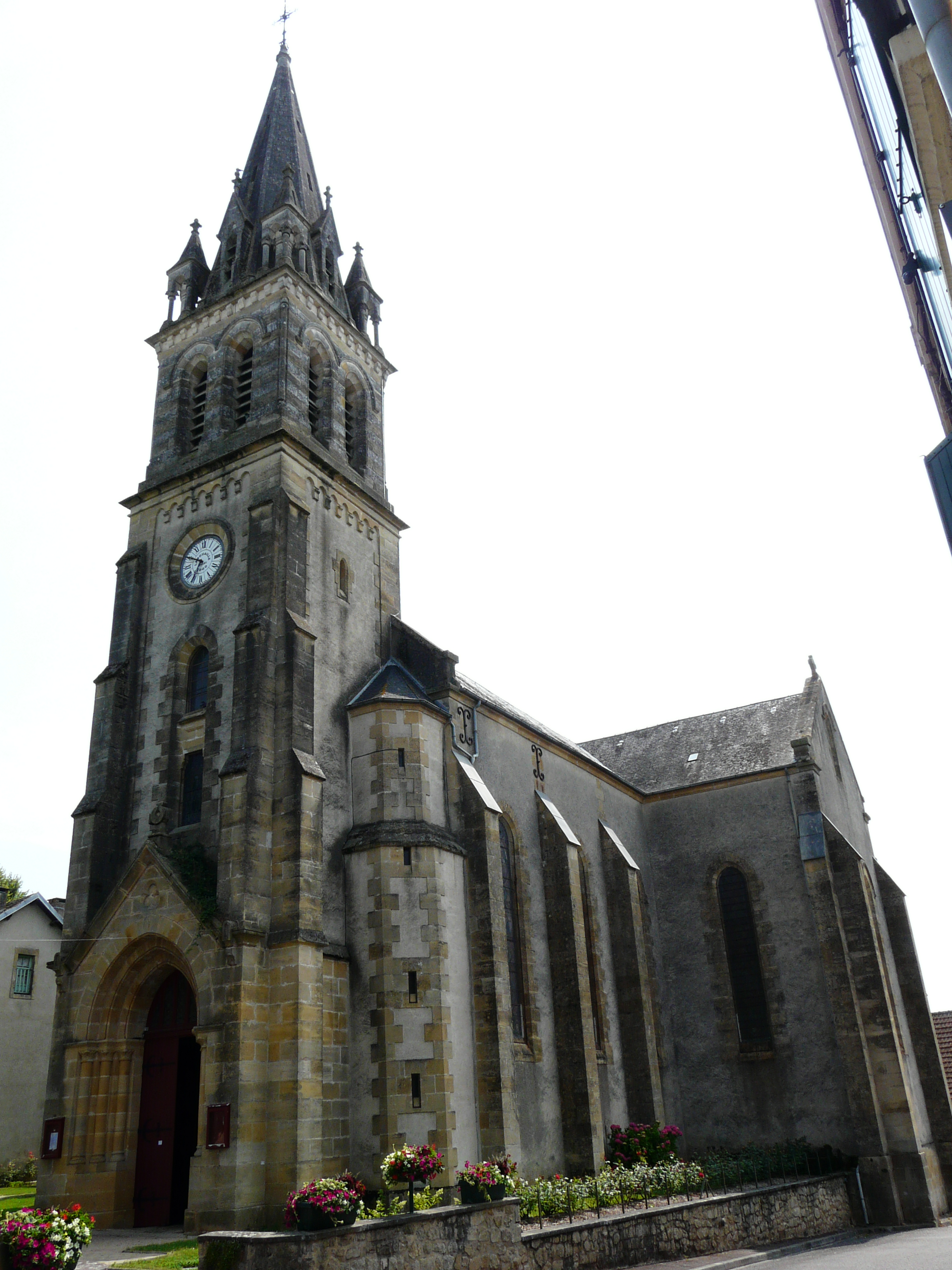 L'église Saint-Pierre-ès-Liens de Lanouaille, Dordogne, France.